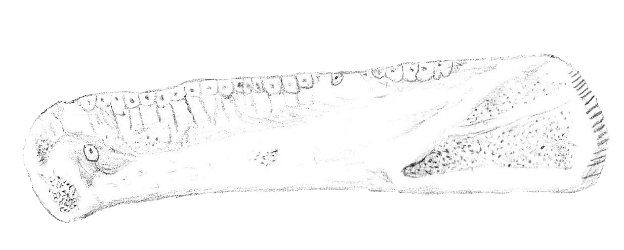 Ilustración del hueso dentario fósil de Rubricacaecilia